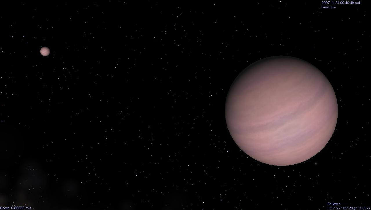 Gliese 876 c